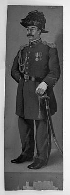 Pizzardone